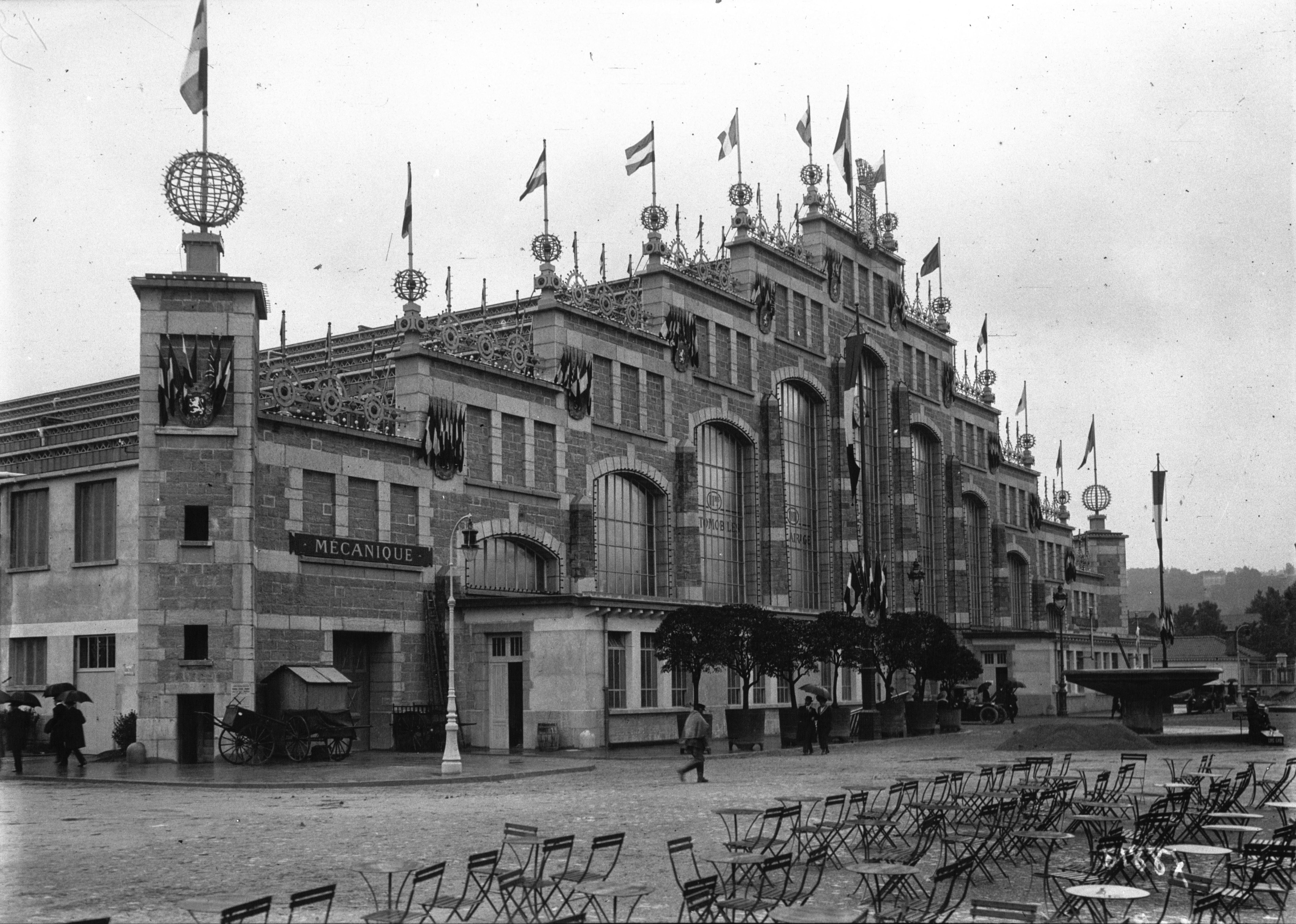 Exposition de Lyon : l'extérieur du Palais de l'Industrie.